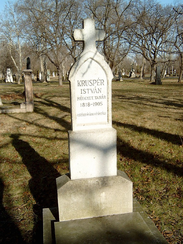 Kruspér István (Miskolc, 1818. január 25. – Budapest, 1905. július 2.) mérnök, műegyetemi tanár sírja Budapesten. Kerepesi temető: 29/3-1-76.